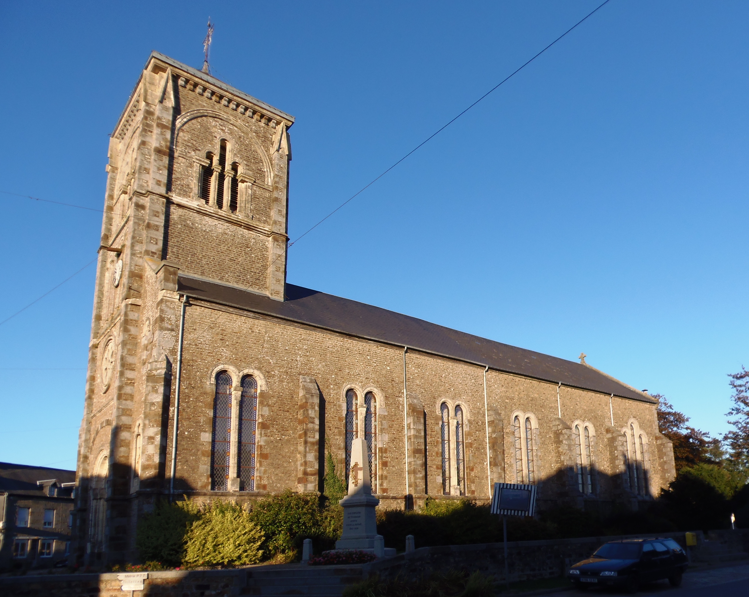 Saint-Cornier-des-Landes (Normandie, France). L'église Saint-Corneille.